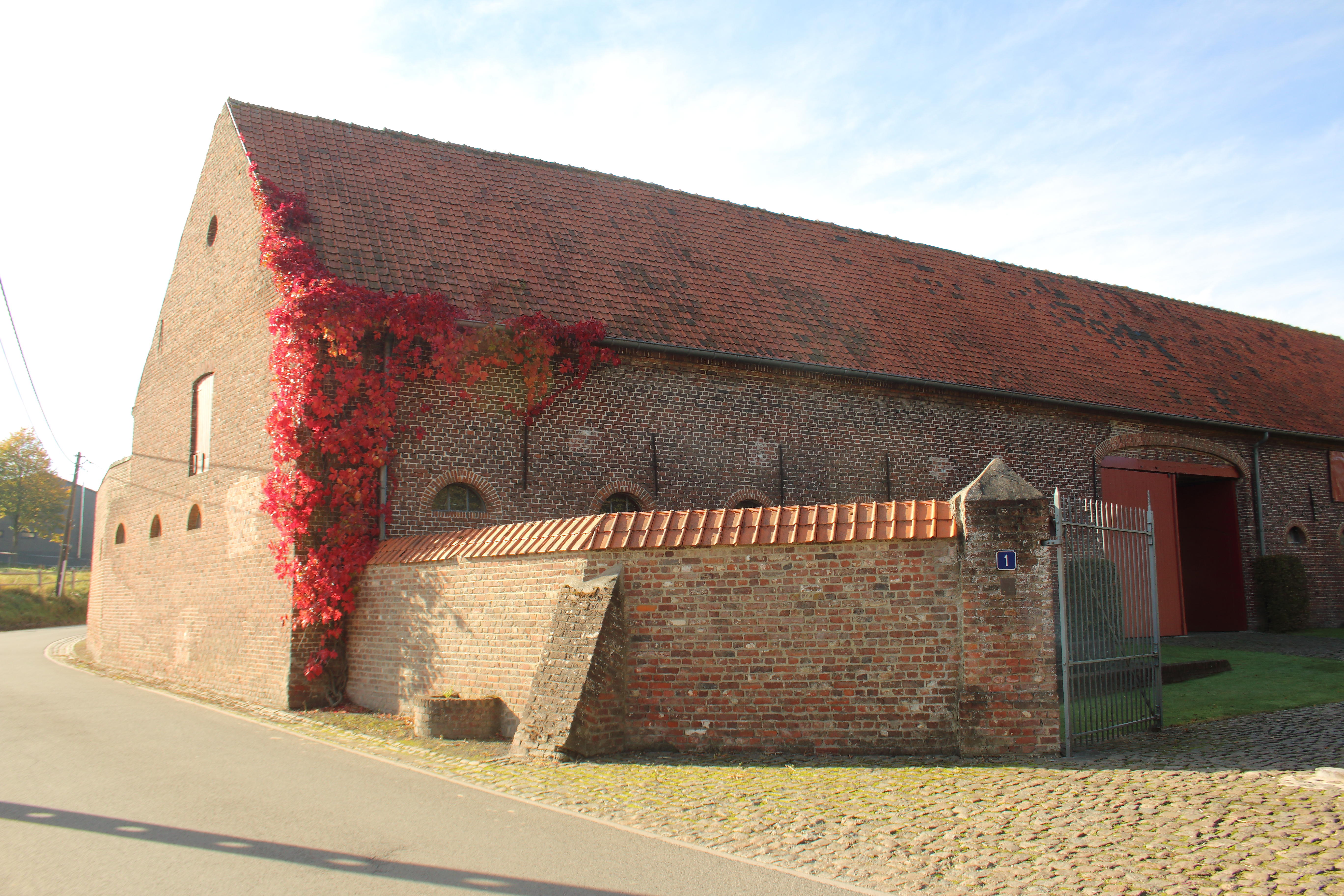 Ruddershoeve, Ruddershovestraat, Velzeke-Ruddershove, Zottegem, Vlaanderen, België